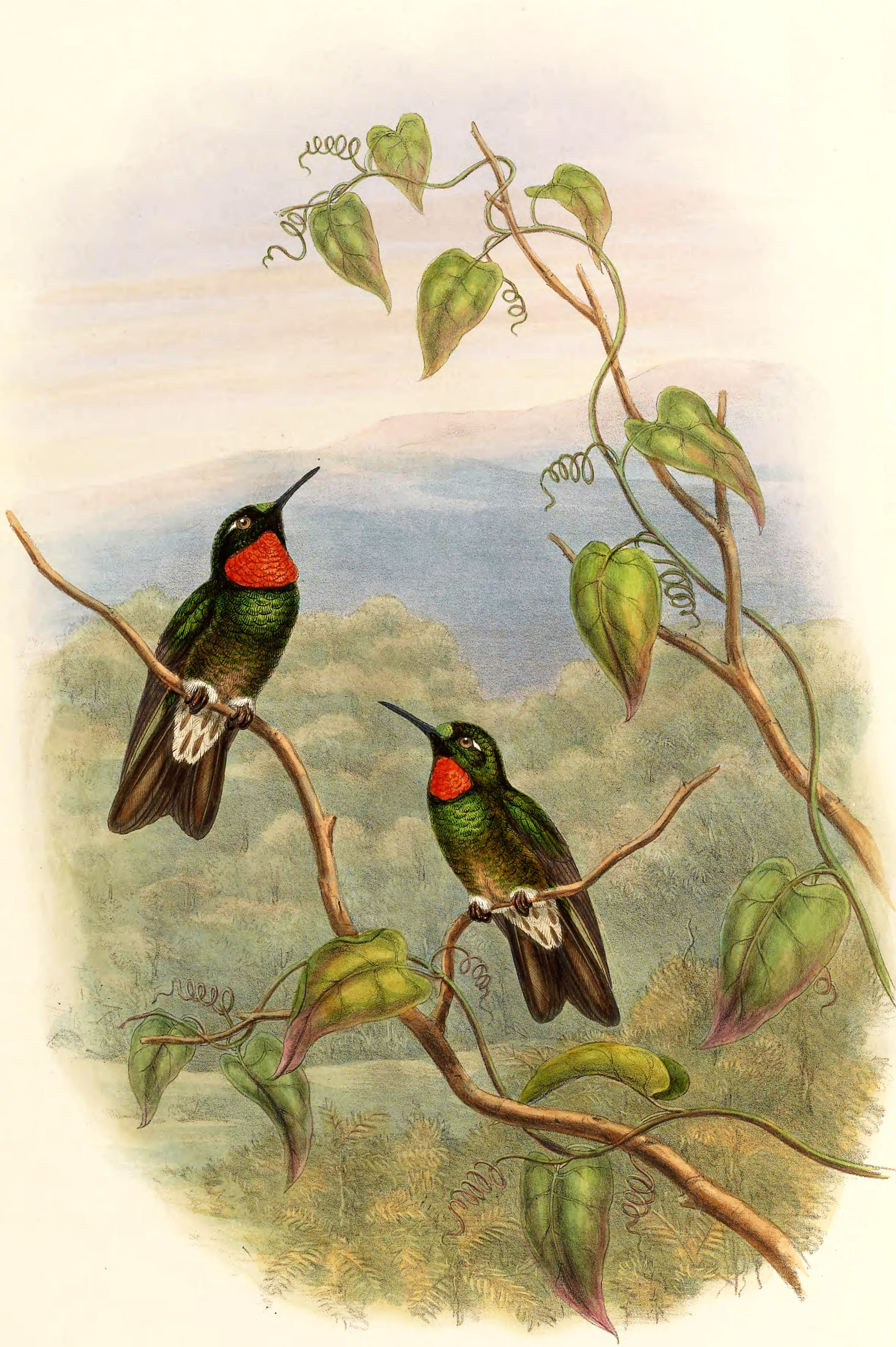 Heliangelus micrastur = Heliangelus micraster [1]